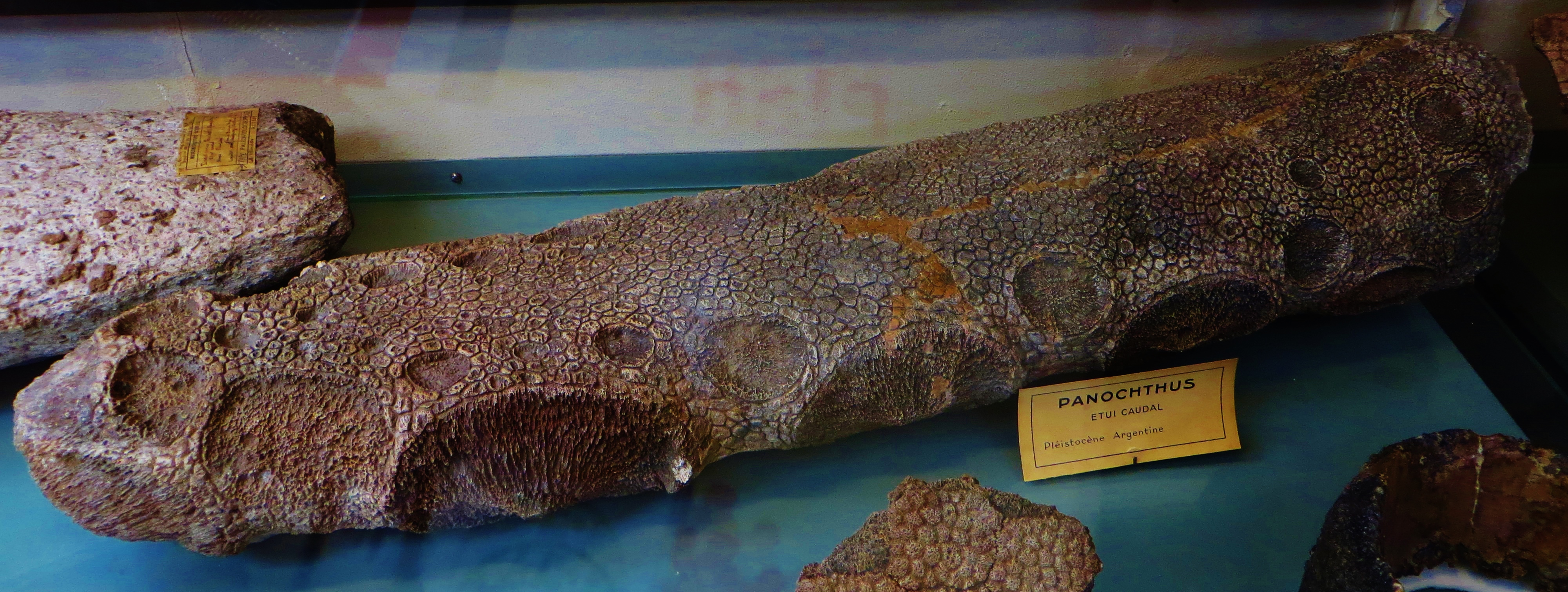 Fossil of Panochthus, an extinct mammal - Took the photo at Musee d'Histoire Naturelle, Paris